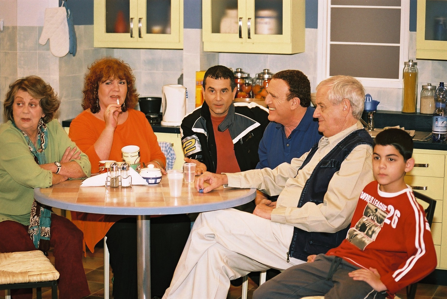 צוות קרובים קרובים (פרק האיחוד) במטבח, מימין לשמאל: תום גל, אילן דר, יהורם גאון, משה גרשוני, תיקי דיין, חנה מרון